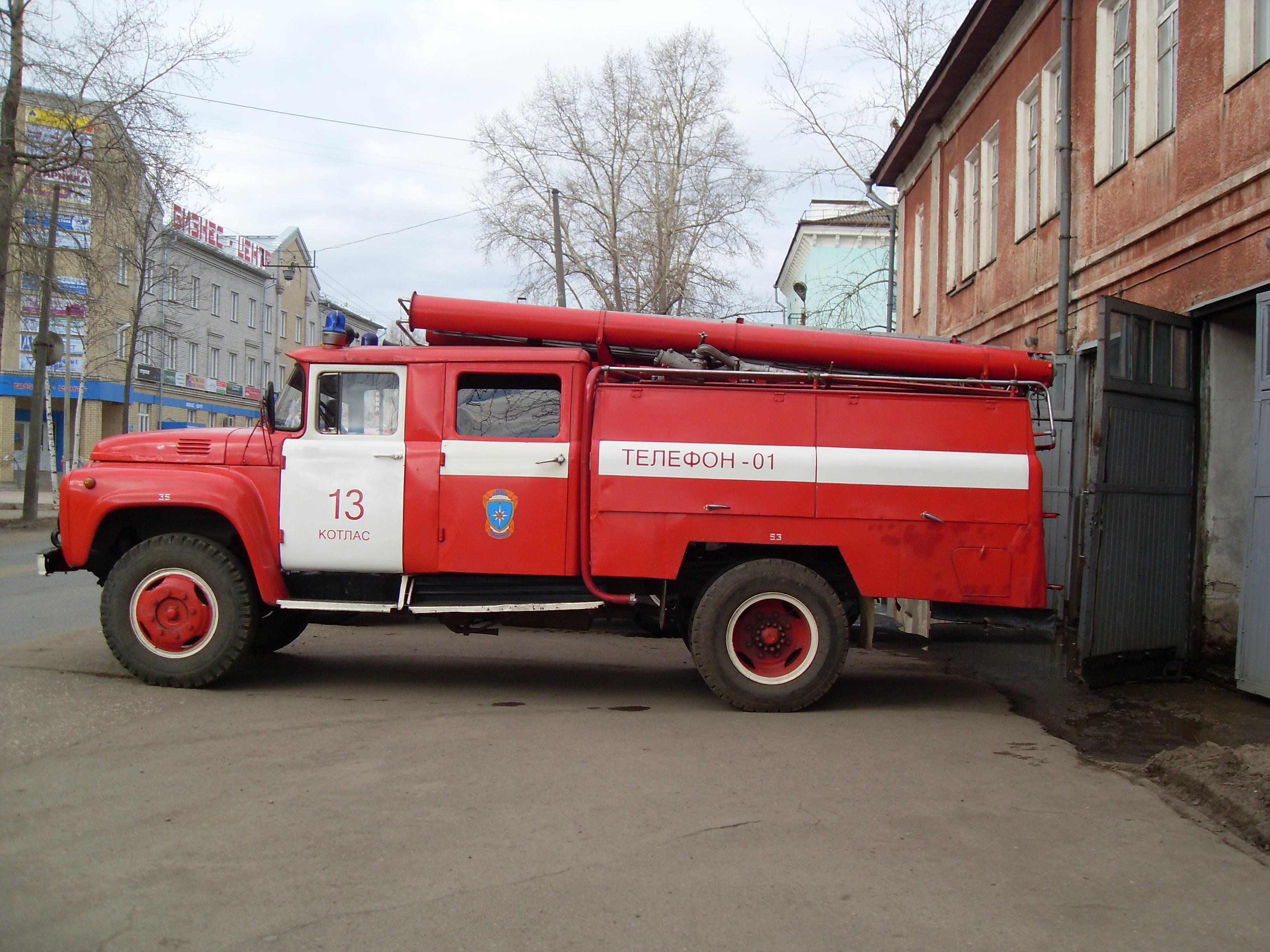 Пожарная автоцистерна ПЧ-13 г.Котлас